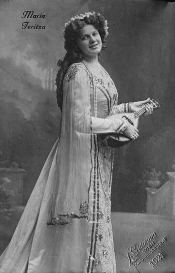 Maria Jeritza (1887 - 1982), Czech opera singer, soprano